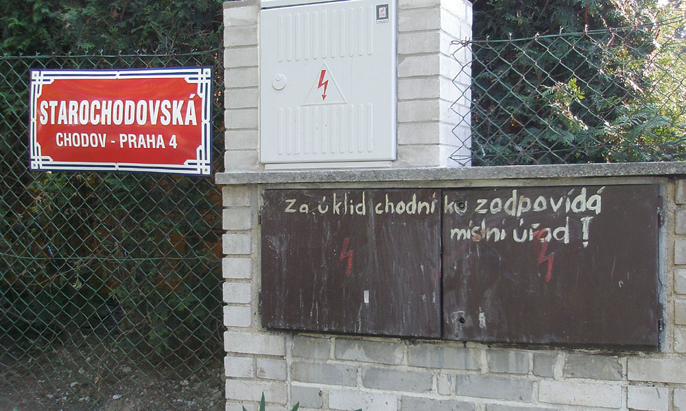 Označení Starochodovské ulice včetně aktuálního zřeknutí se úklidu chodníku